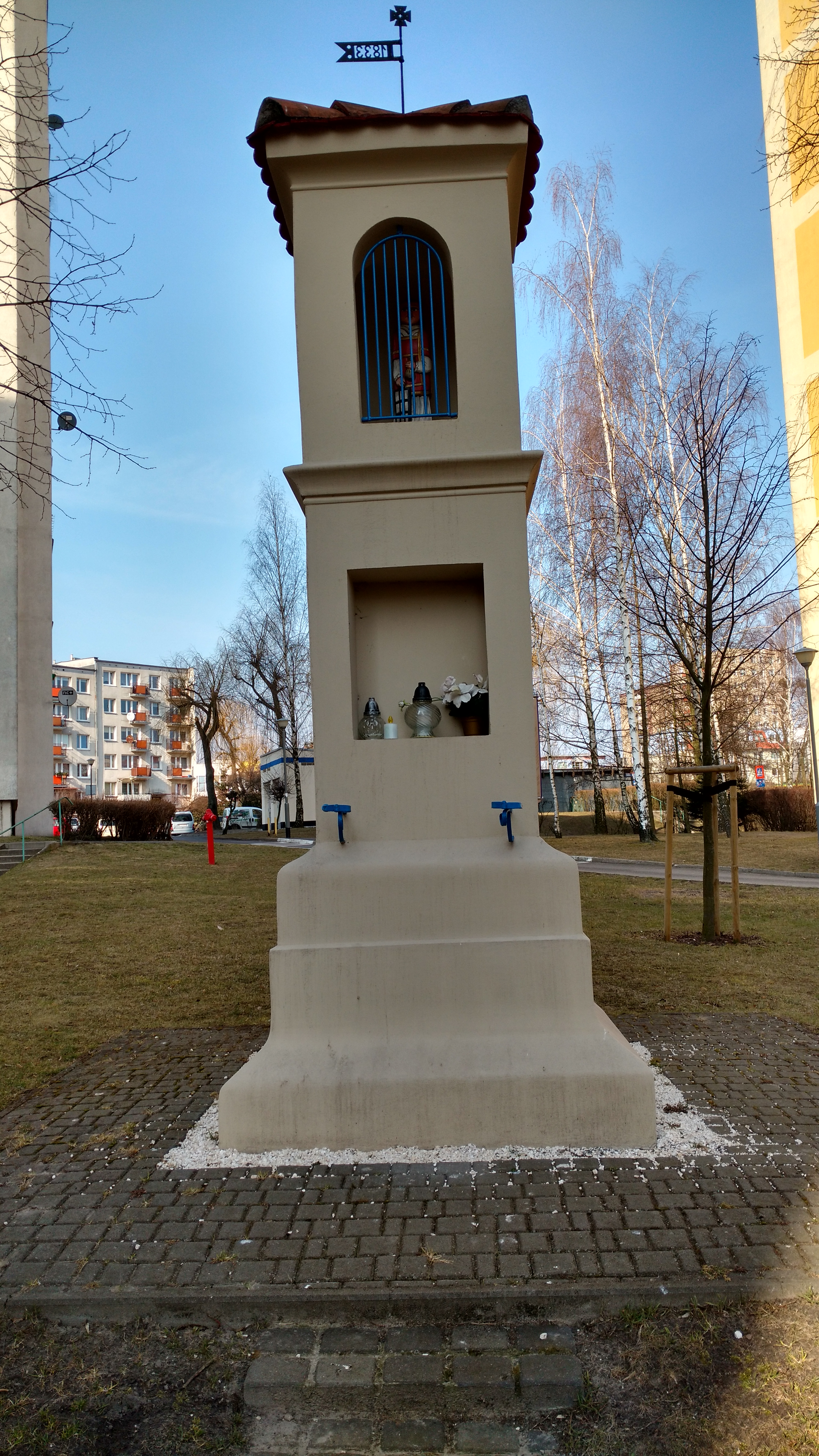 Kapliczka św. Wawrzyńca na poznańskich Winiarach